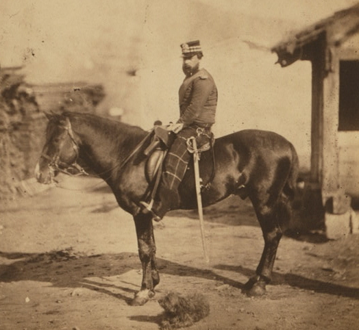 Viscount Kirkwall, Captain 71st Highlanders. [i.e. George FitzMaurice.]